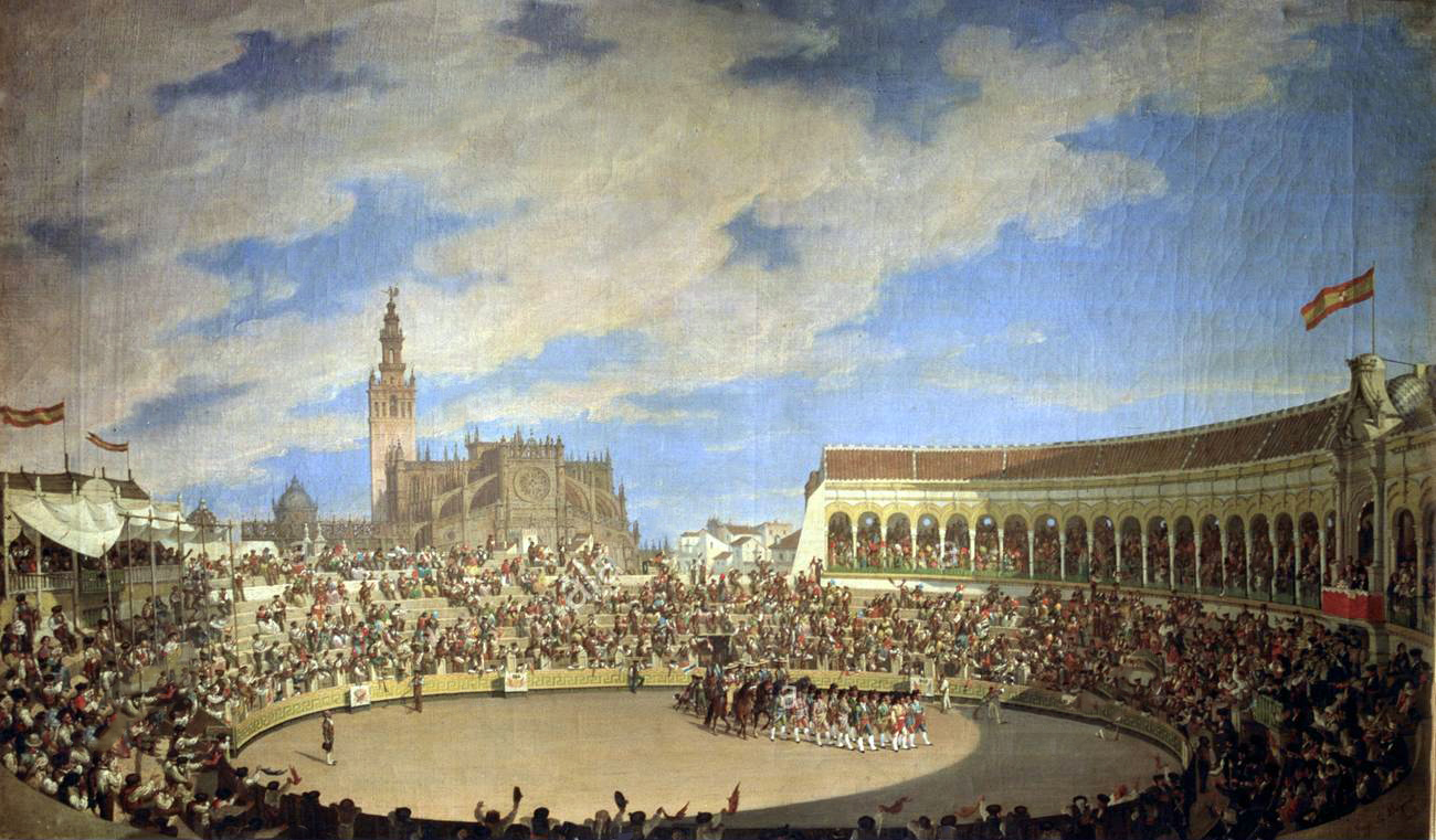 Plaza de la Real Maestranza, 56.5 x 101 cm, Inv. CTB.1994.36